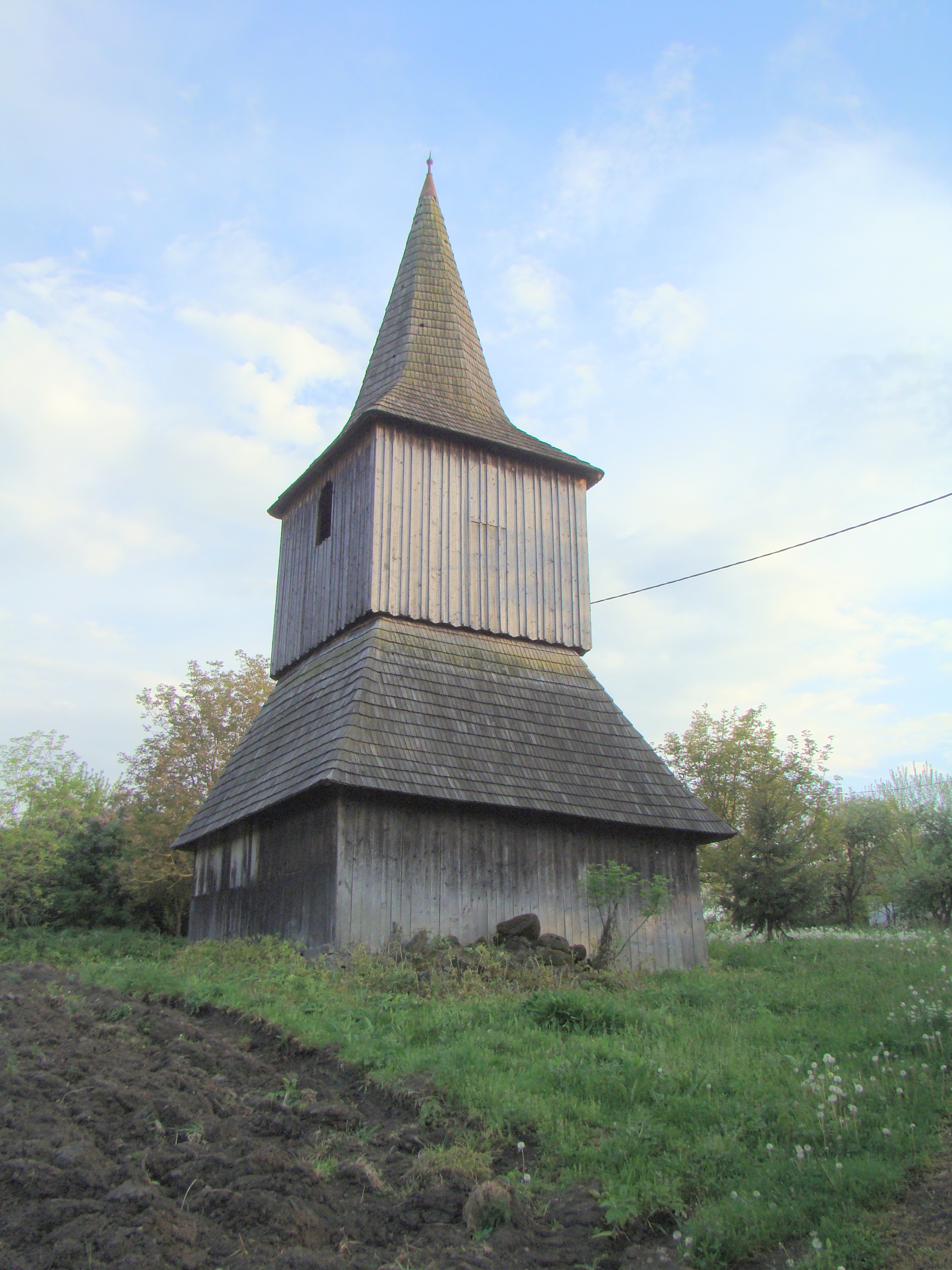 Turn clopotniță din lemn, sat Fântânele; comuna Matei 02